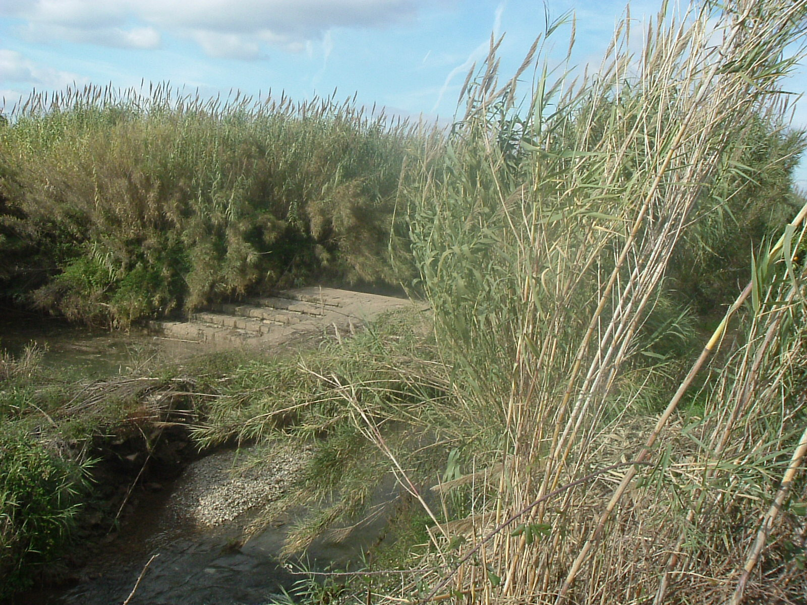 Assut de la séquia de Mestalla en el riu Túria